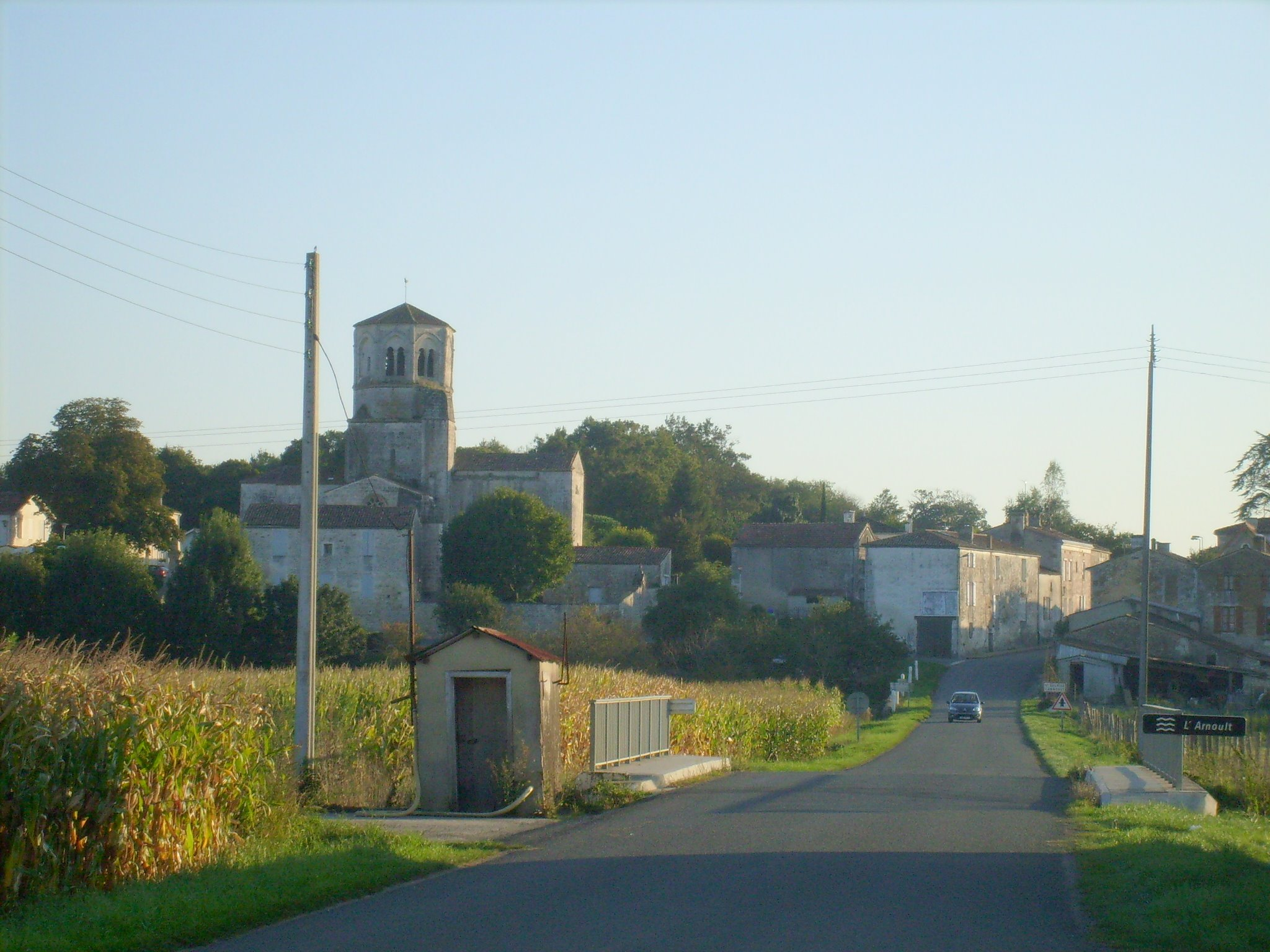 Le village de Saint-Sulpice d'Arnoult